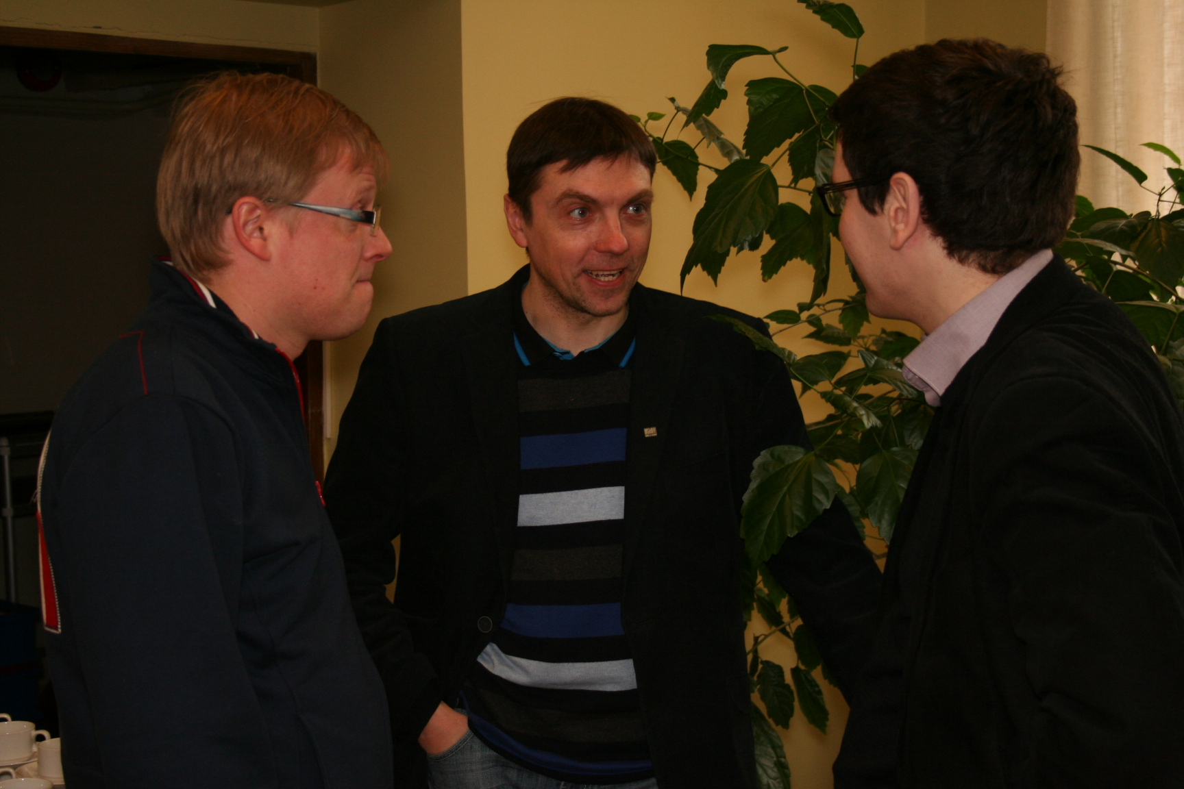 Mika Keränen, Jaanus Vaiksoo ja Peeter Helme Kirjanike Liidu üldkogu Tartus 23. märtsil 2012.